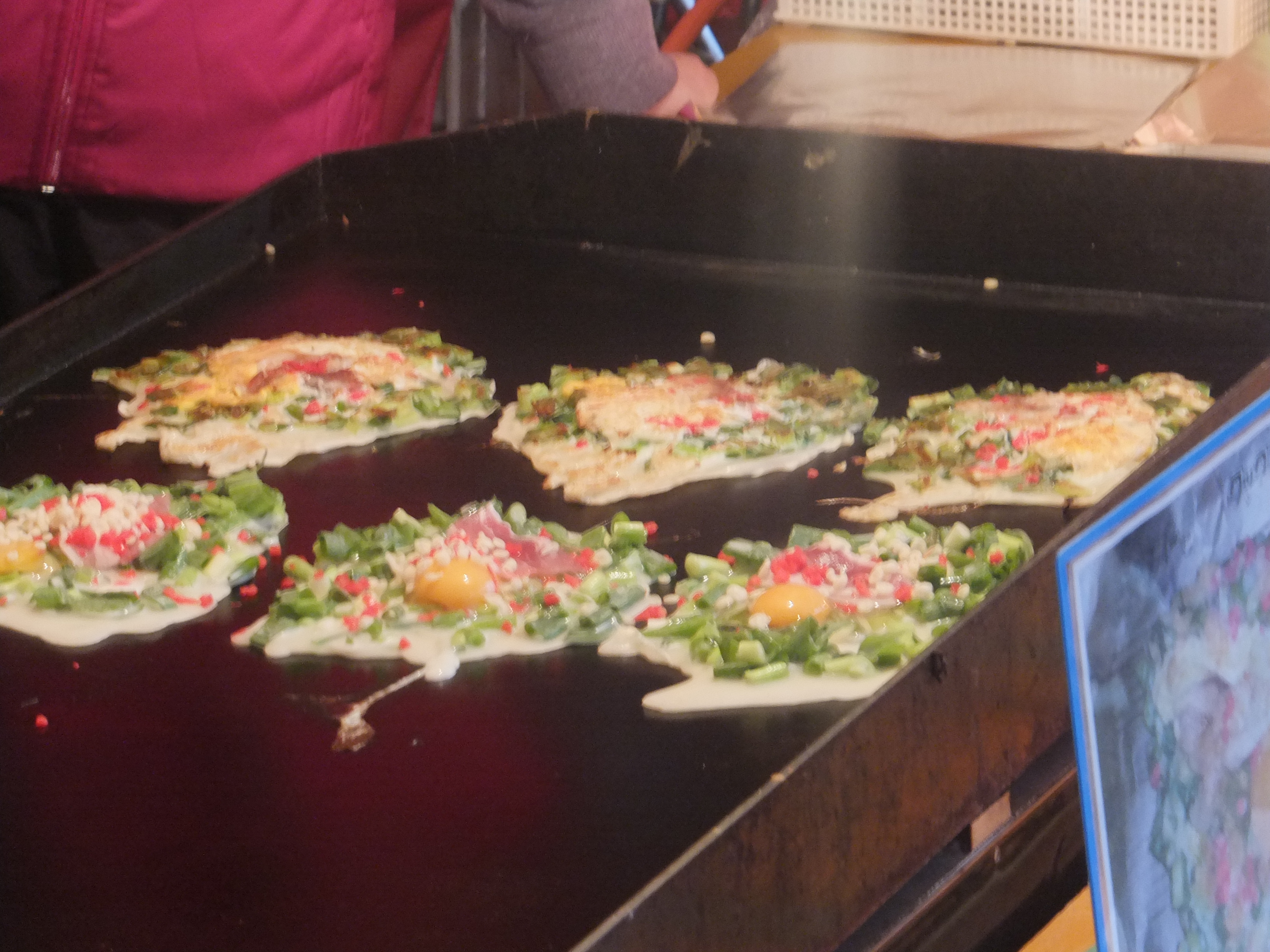 ねぎ焼き。愛知県豊川市内の屋台にて